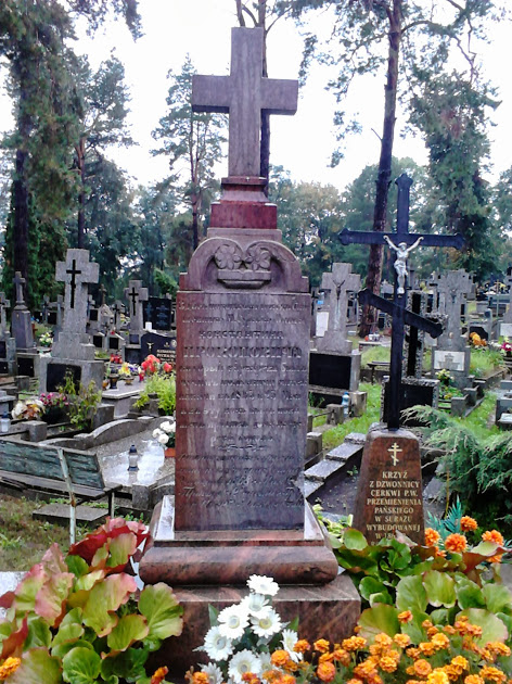 Cmentarz prawosławny w Białymstoku (Jaroszówka). Nagrobek ks. Konstantego Prokopowicza powieszonego przez powstańców styczniowych oraz krzyż z nieistniejącej dzwonnicy cerkwi w Surażu